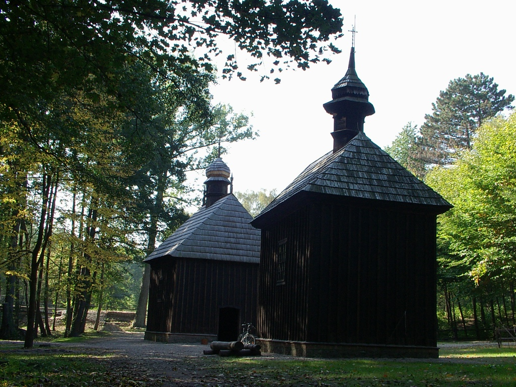 Zabytkowe kapliczki św. Rocha (bliżej) i św. Antoniego (dalej), w Lesie Łagiwnickim. Historic St Roch's (in foreground) and St Antony's chapels in Łagiewniki Forest. (Łódź, Poland) author: Bogdan Janus, Łódź, Poland